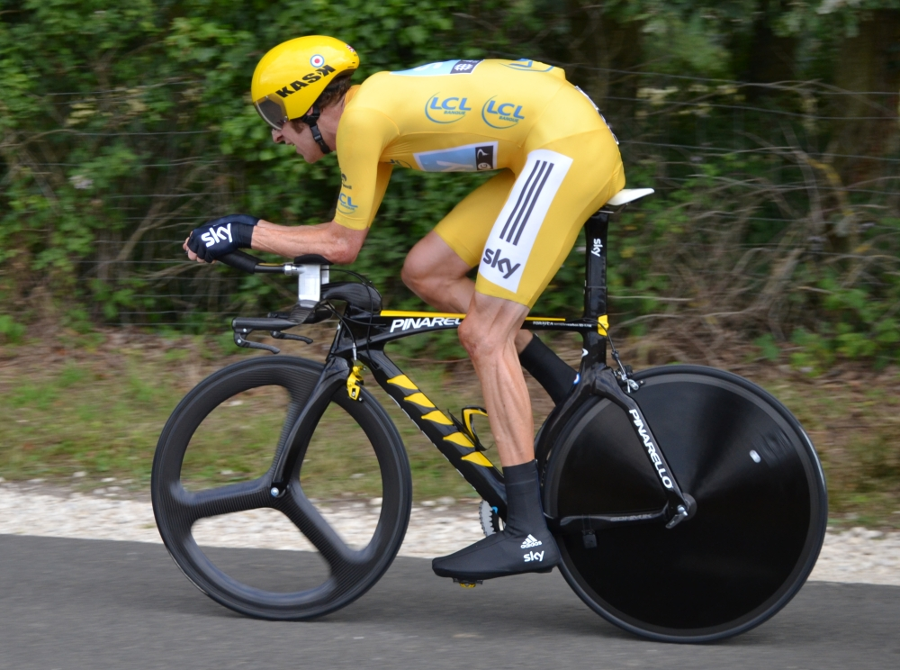 Bradley Wiggins TDF2012